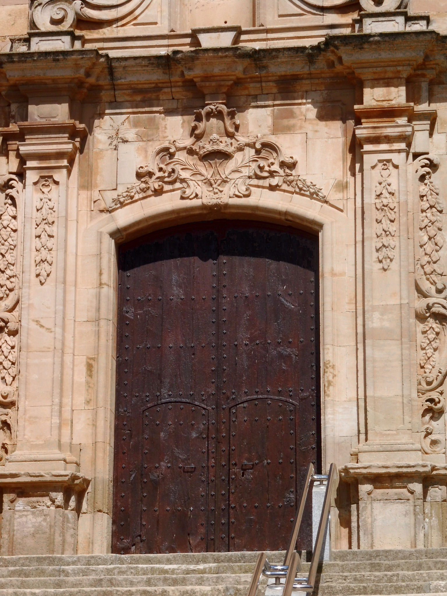 Església parroquial de Santa Maria de Granyena de Segarra